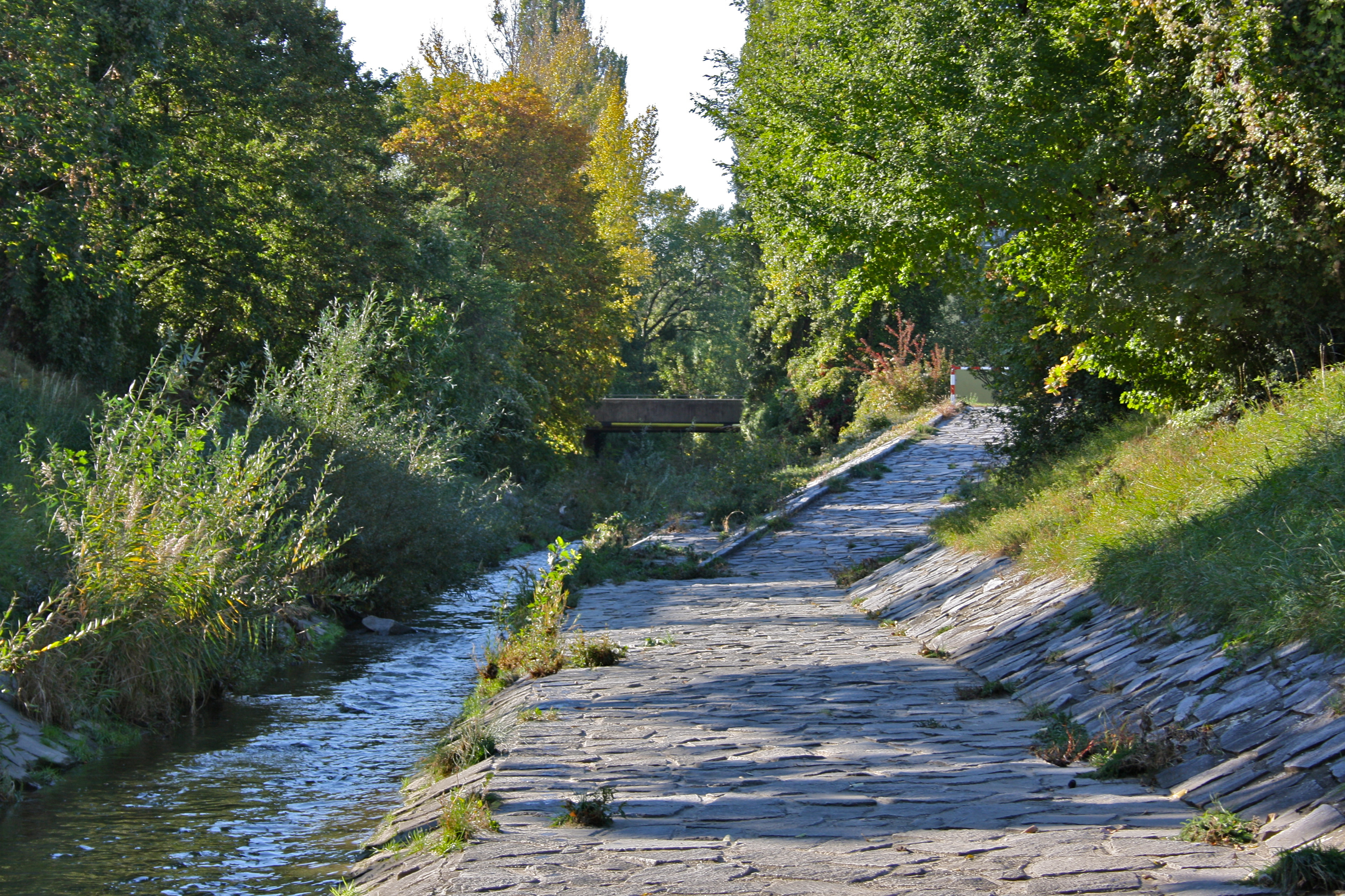 Liesingbach in Inzersdorf.